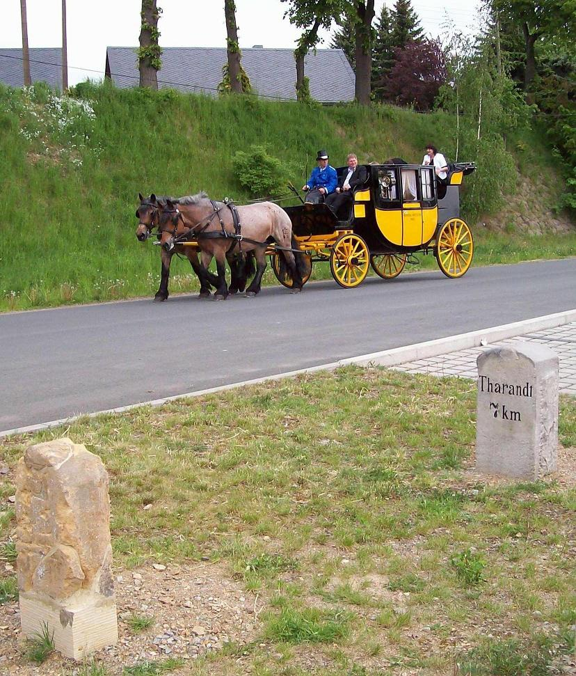 Postkutsche und Kilometer- sowie Chausseestein am Bahnhof Wilsdruff